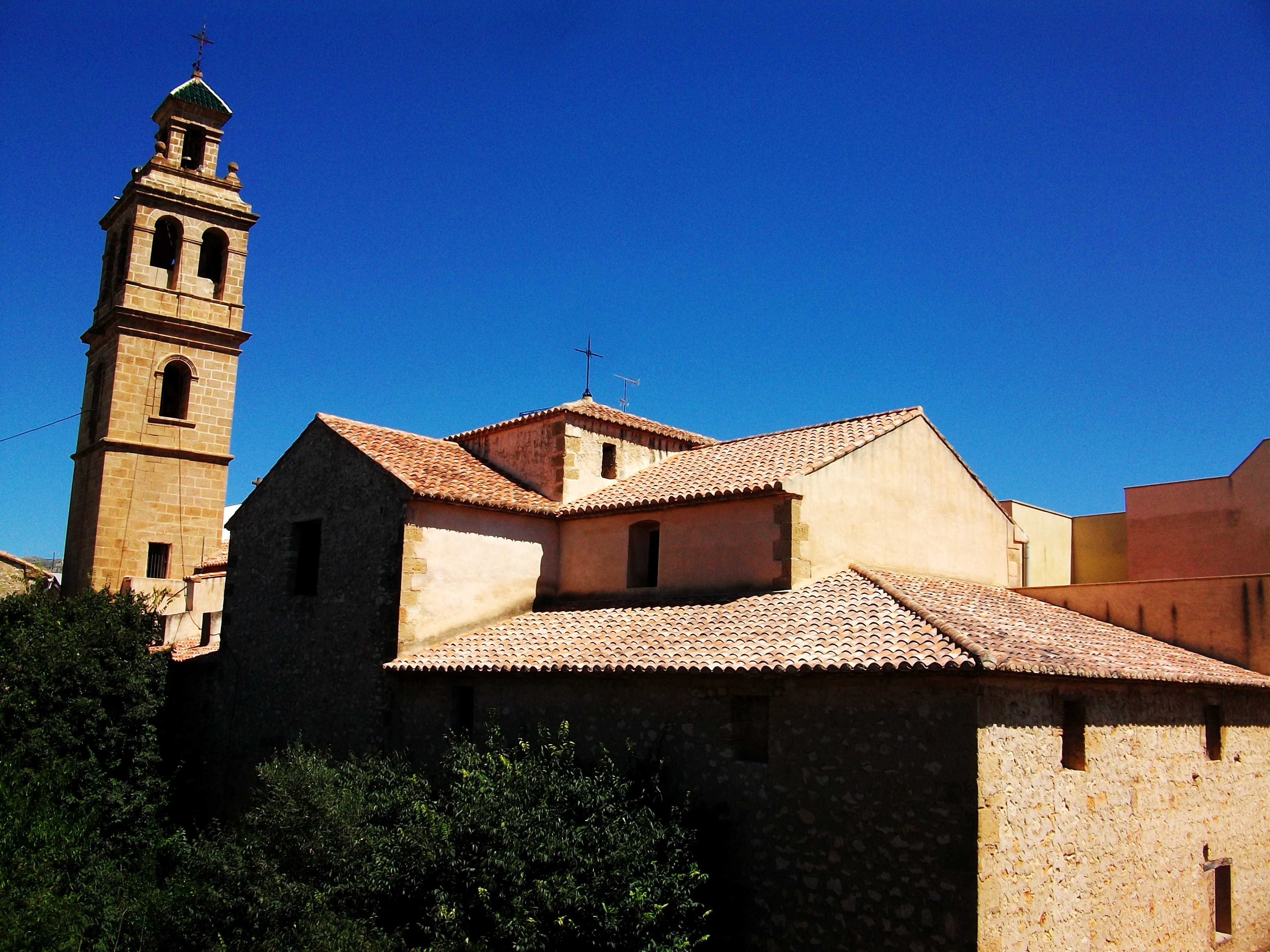 Església de Gata de Gorgos per la part posterior, s'observa el creuer i el campanar.